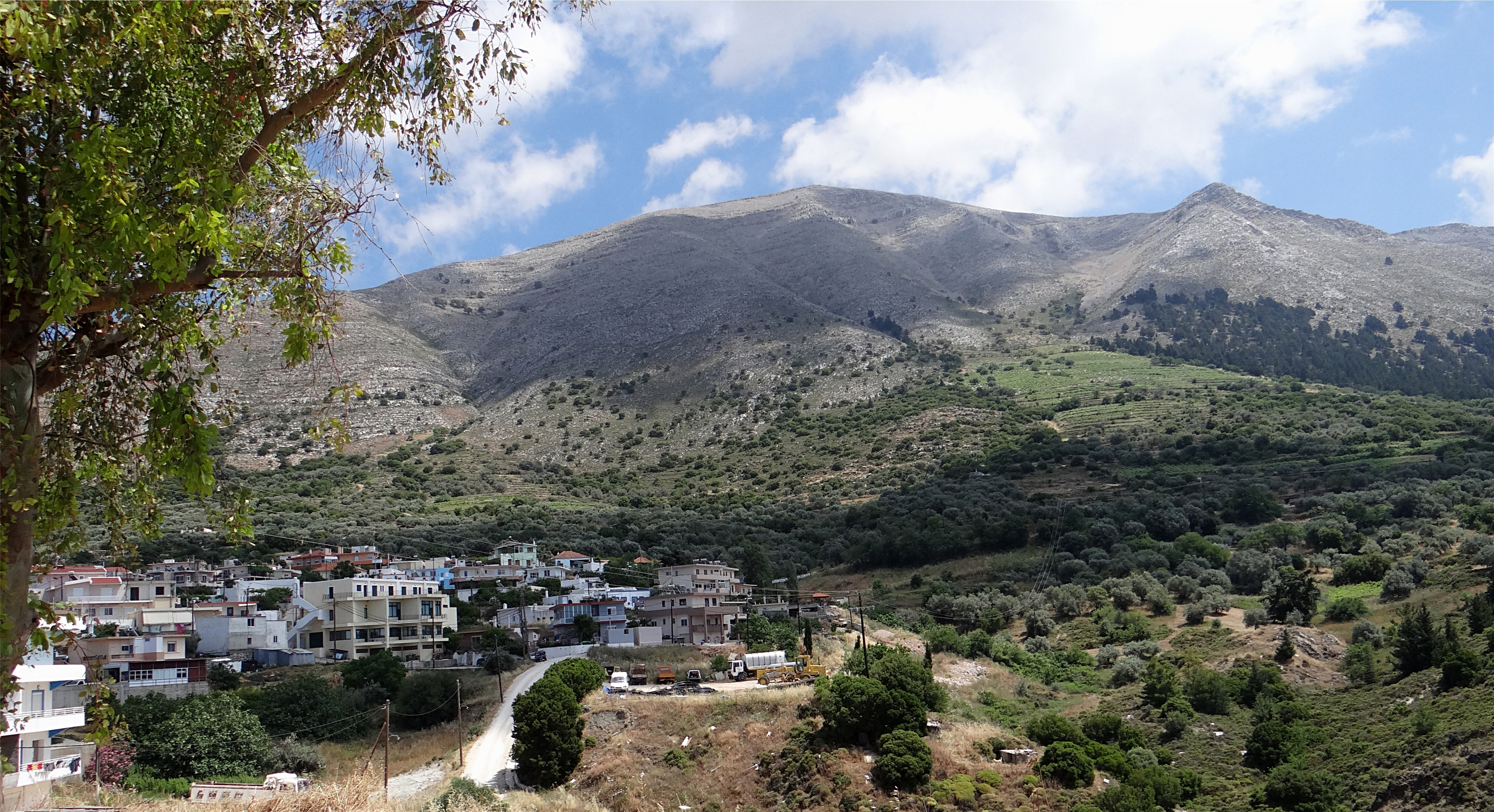 Le mont Attavyros vu du village d'Emponas, Rhodes, Grèce.